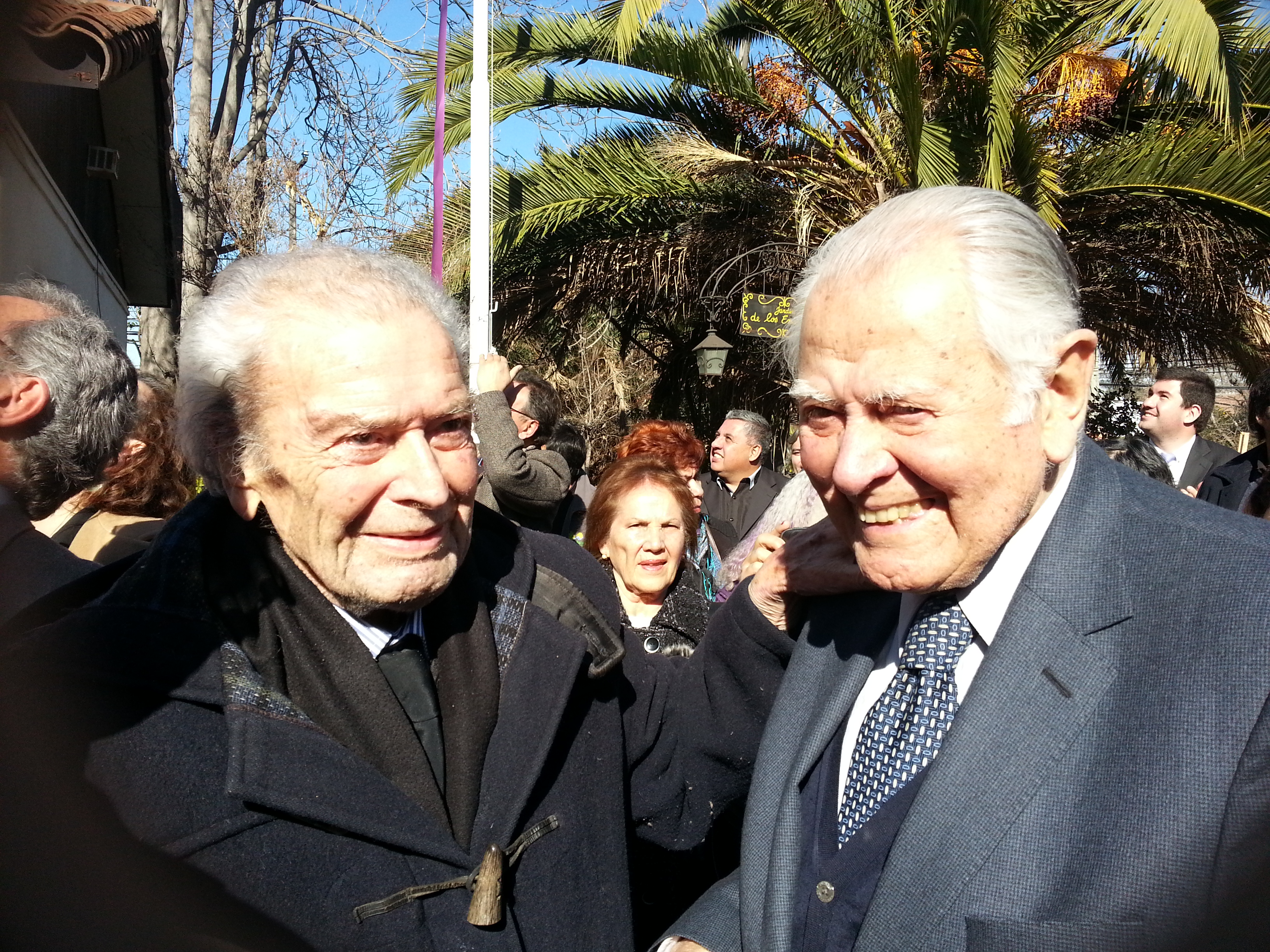 Fernando Castillo Velasco, Rector Emérito PUC, junto al ex Presidente de Chile, Patricio Aylwin Azócar, el día 1° de julio de 2013